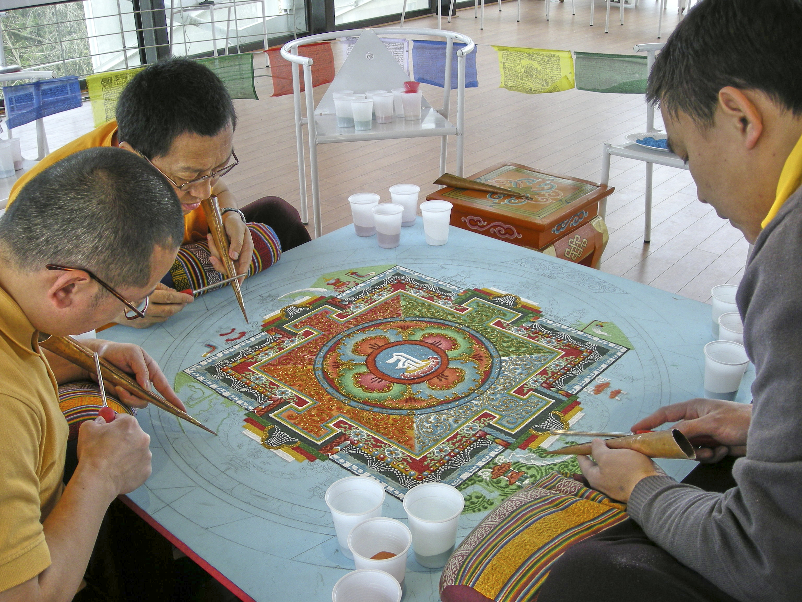 Deuxième jour de la réalisation d'un mandala de sable "Pour la paix dans le monde", par trois lamas du temple des Mille Bouddhas, à la Tour de la Liberté de Saint-Dié-des-Vosges, les 11, 12 et 13 avril 2008